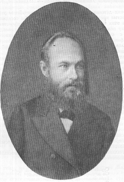 Л. Н. Трефолев. Фотография. 1880-е годы / Айзеншток И. Я. Трефолев // История русской литературы: В 10 т. / АН СССР. Ин-т рус. лит. (Пушкин. Дом). — М.; Л.: Изд-во АН СССР, 1941—1956. Т. IX. Литература 70—80-х годов. Ч. 1. — 1956. — С. 472—486.